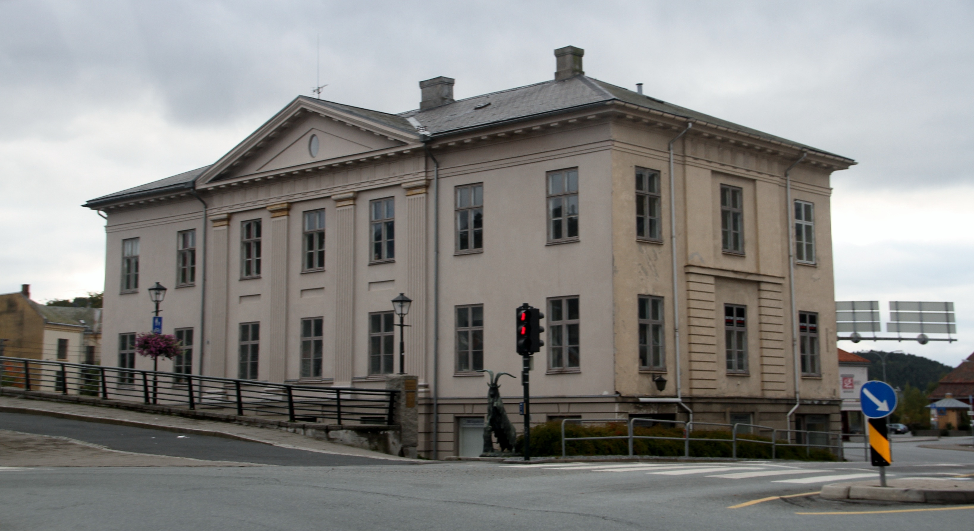 Photo from the city of Halden (Østfold county), in southeastern Norway. Kongegården from 1820.